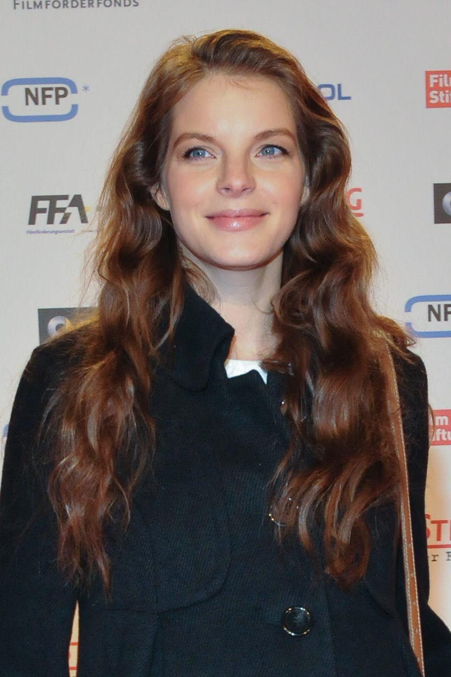 Yvonne Catterfeld auf der Premiere von "Stromberg - Der Film" in Köln am 18. Februar 2014.